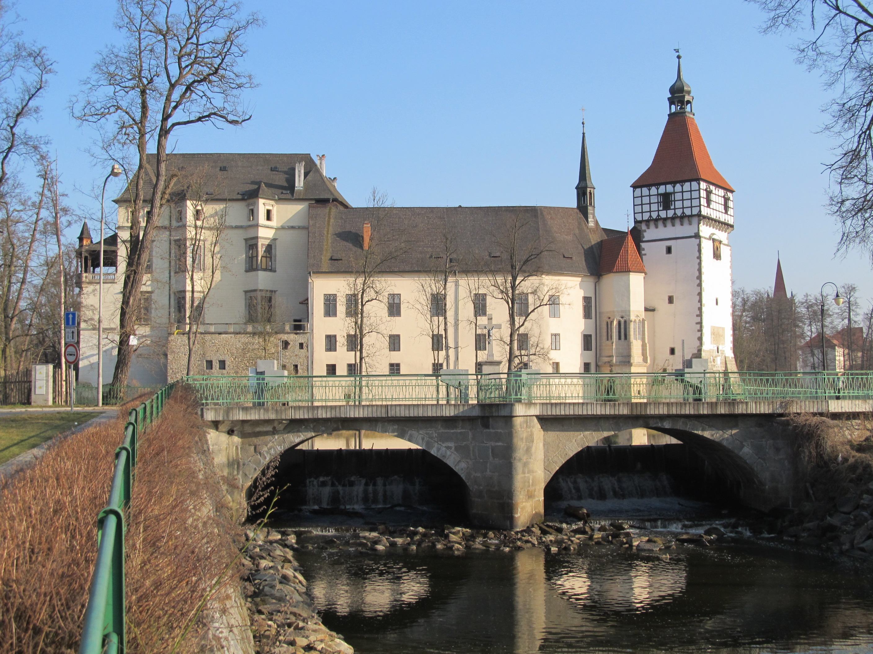 Blatná - most u zámku přes Lomnici